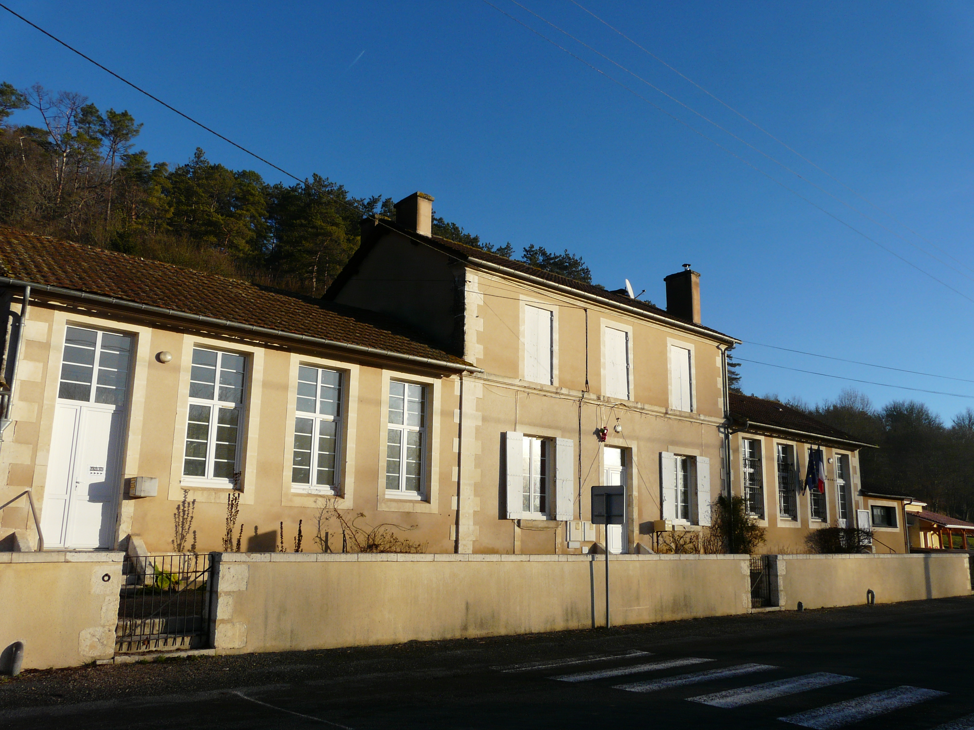 La mairie et l'ancienne école de Salon, Dordogne, France.